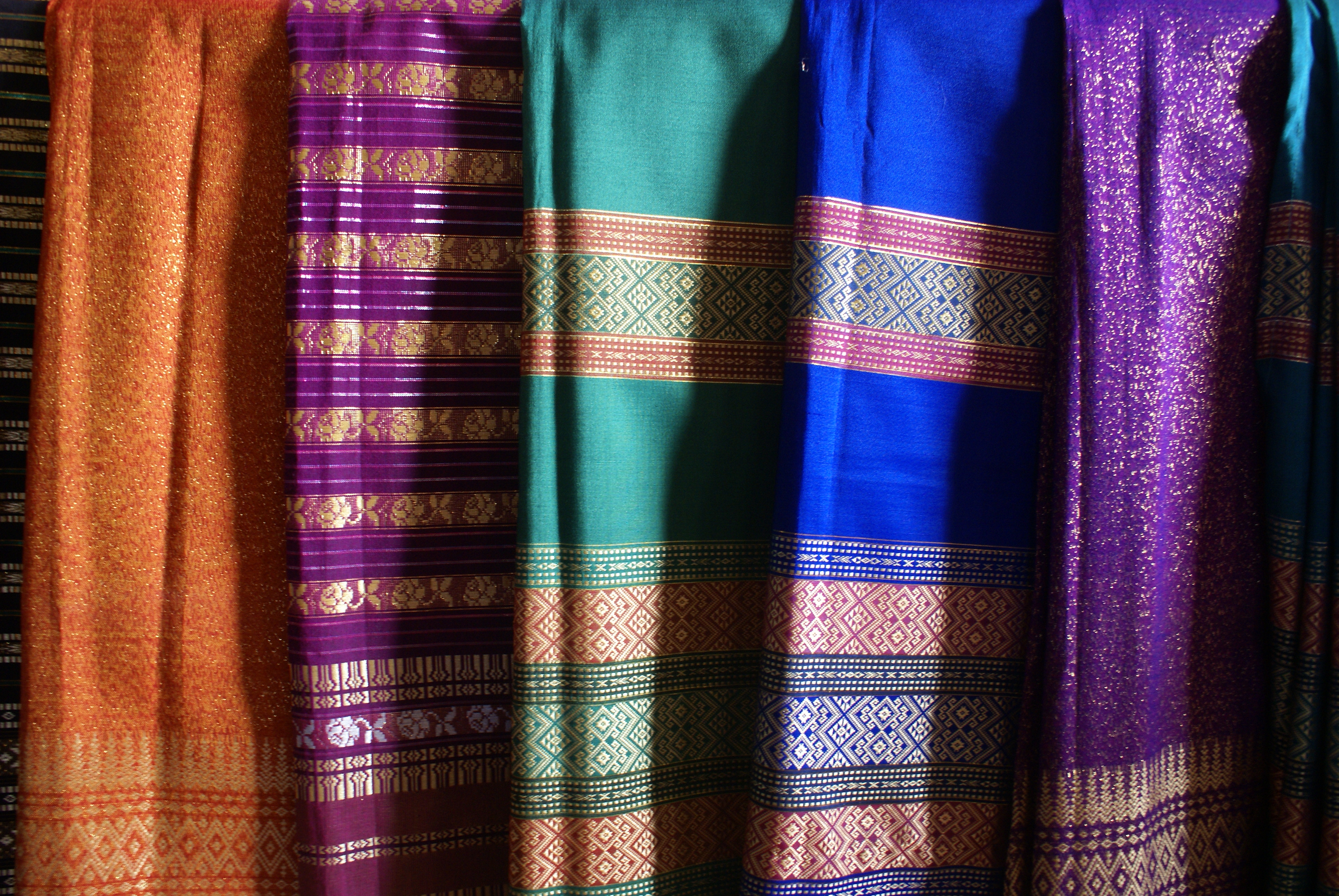 Textiles from Đa Phước, An Phú, An Giang (near Chau Doc), An Giang, Vietnam.